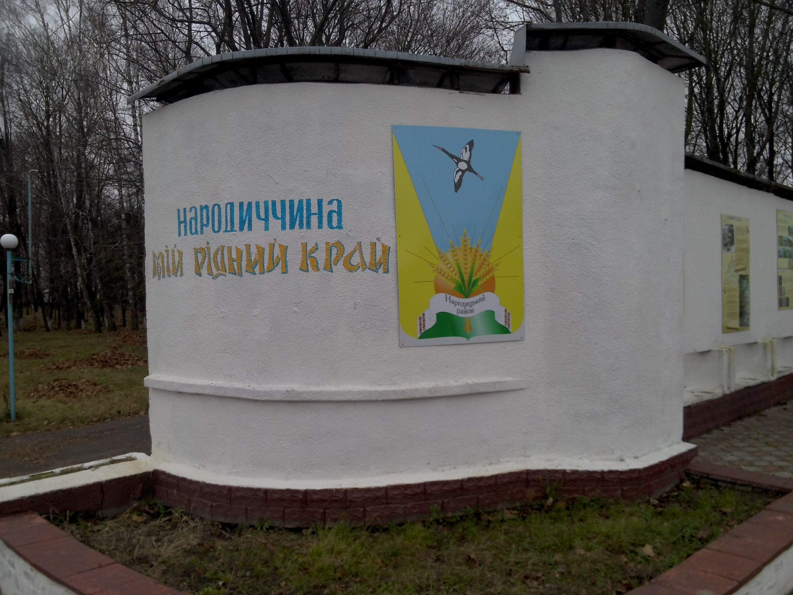 смт Народич